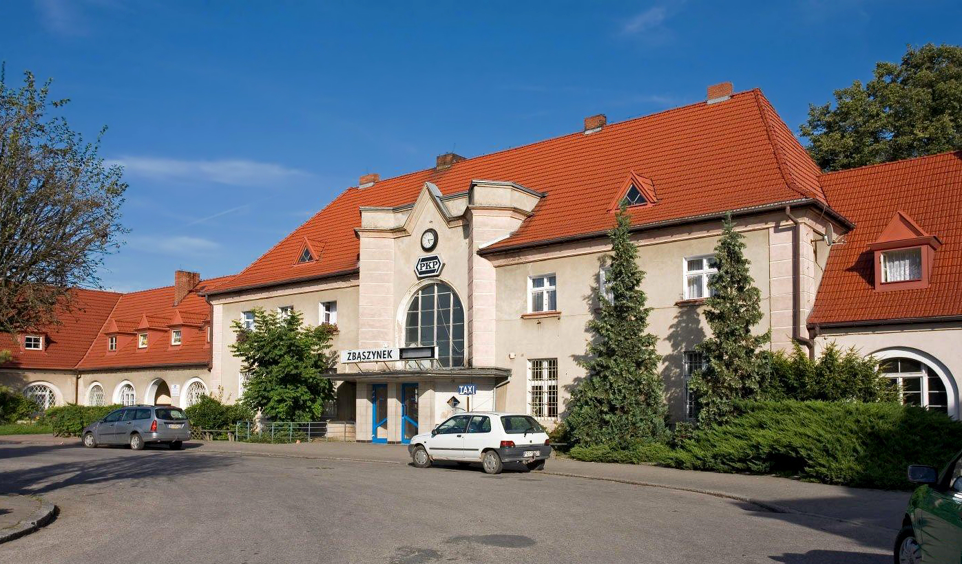 Środkowa część budynku dworca. Zaskakująco małe jest wnętrze przeznaczone dla podróżnych. Ale węzeł Zbąszyń, jako stacja graniczna wymagała sporej admininstracji, dodatkowo w jednym skrzydle siedzibę miała poczta.